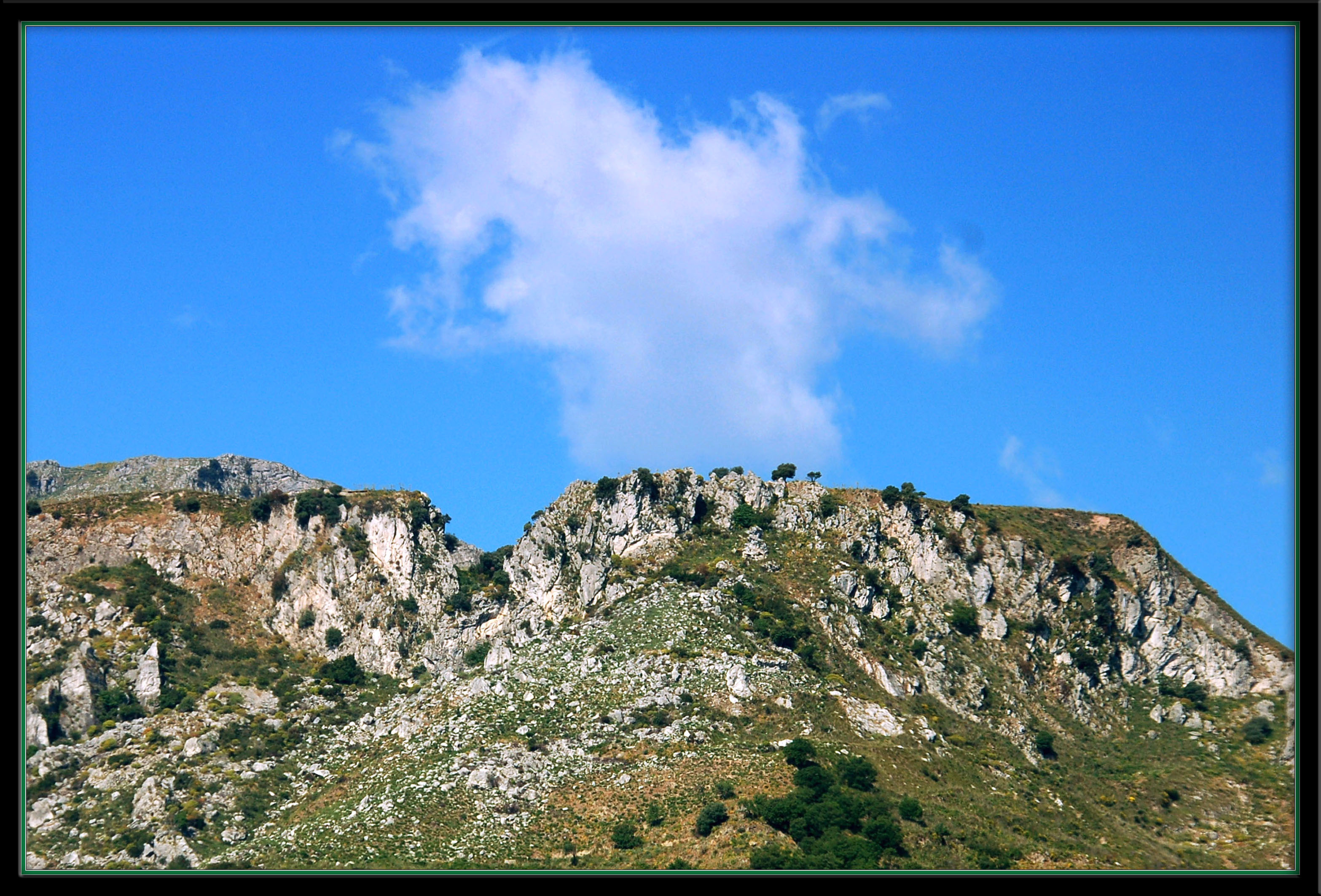 I Monti Iblei (Monti Climiti) vicino Siracusa (Sicilia)